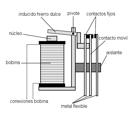 Partes de un rele